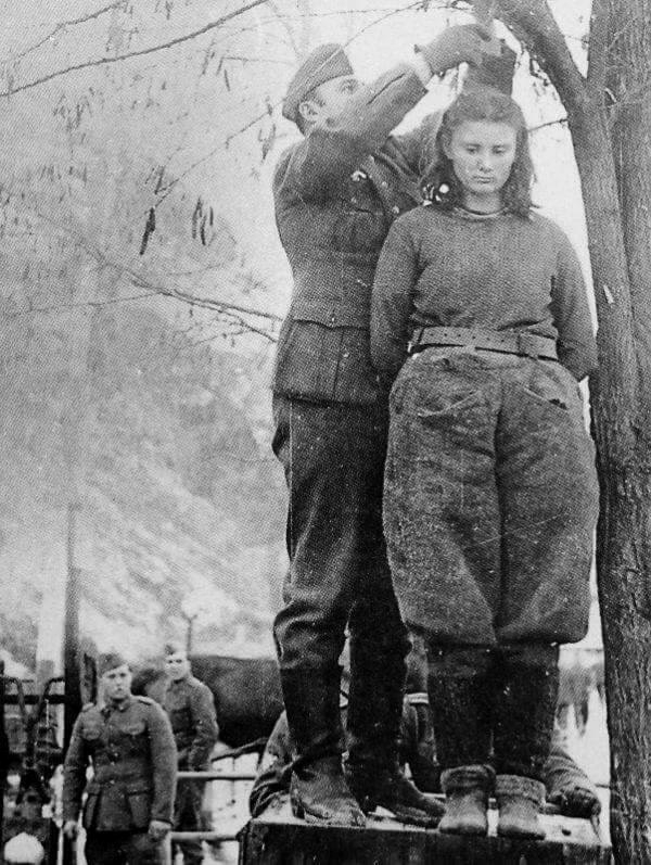 Vešanje Lepe Radić u Bos. Krupi februara 1943